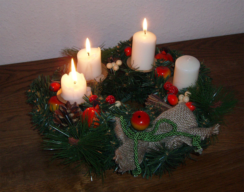 Adventskranz mit drei brennenden Kerzen (dritter Advent)